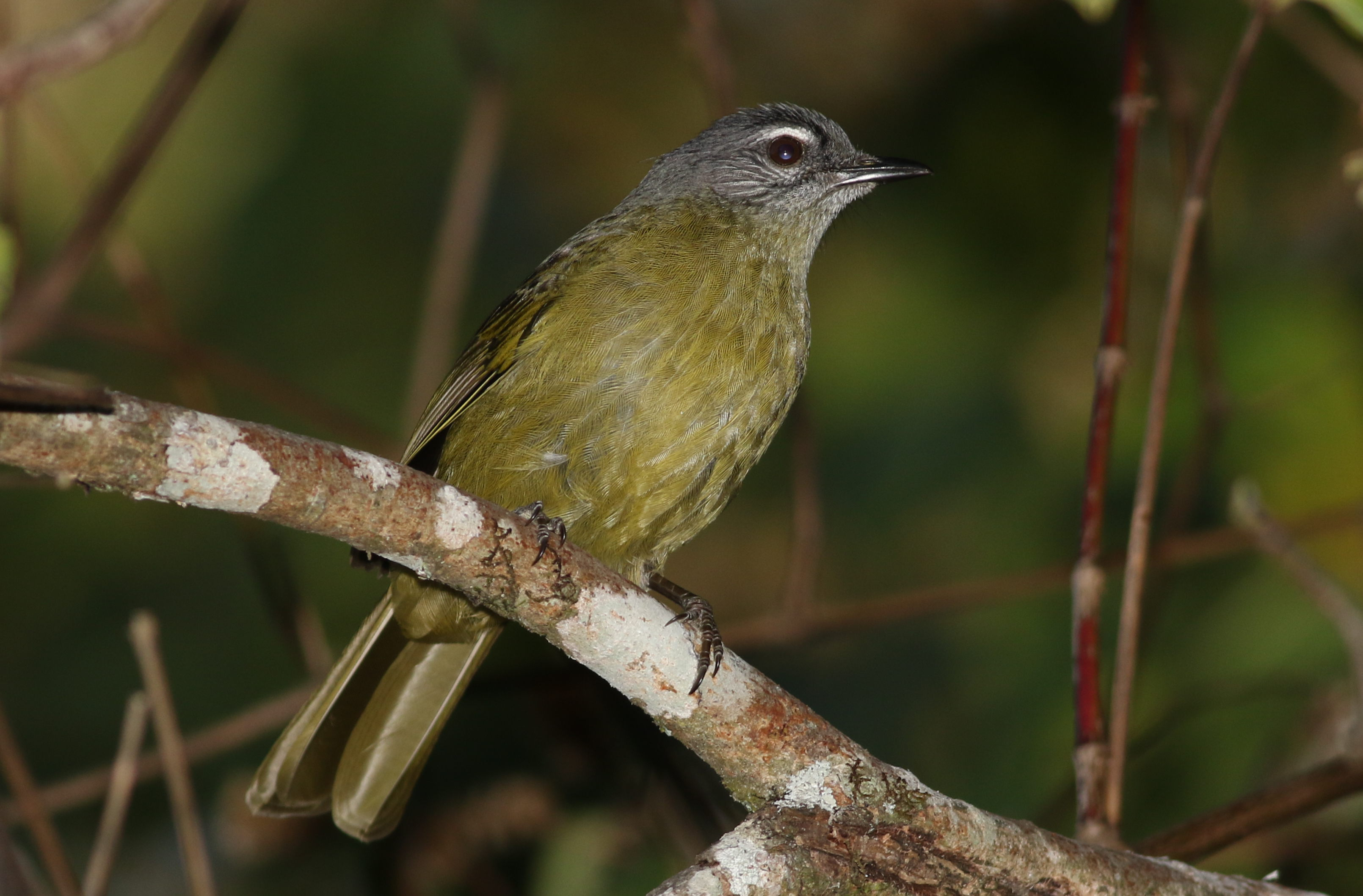 Stripe-cheeked greenbul, Arizelocichla milanjensis, at Seldomseen, Vumba, Zimbabwe